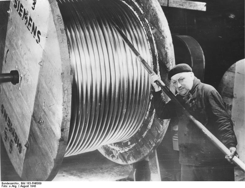 Kroatischer Fremdarbeiter bei Siemens ADN-ZB-Archiv II. Weltkrieg 1939-45 Ein von den Nazis zwangsverschleppter kroatischer Arbeiter im Siemens-Kabelwerk in Berlin. (Aufnahme: 19.8.1943 Freigabedatum] 3849-43 Scherl Bilderdienst, Werkfoto Siemens